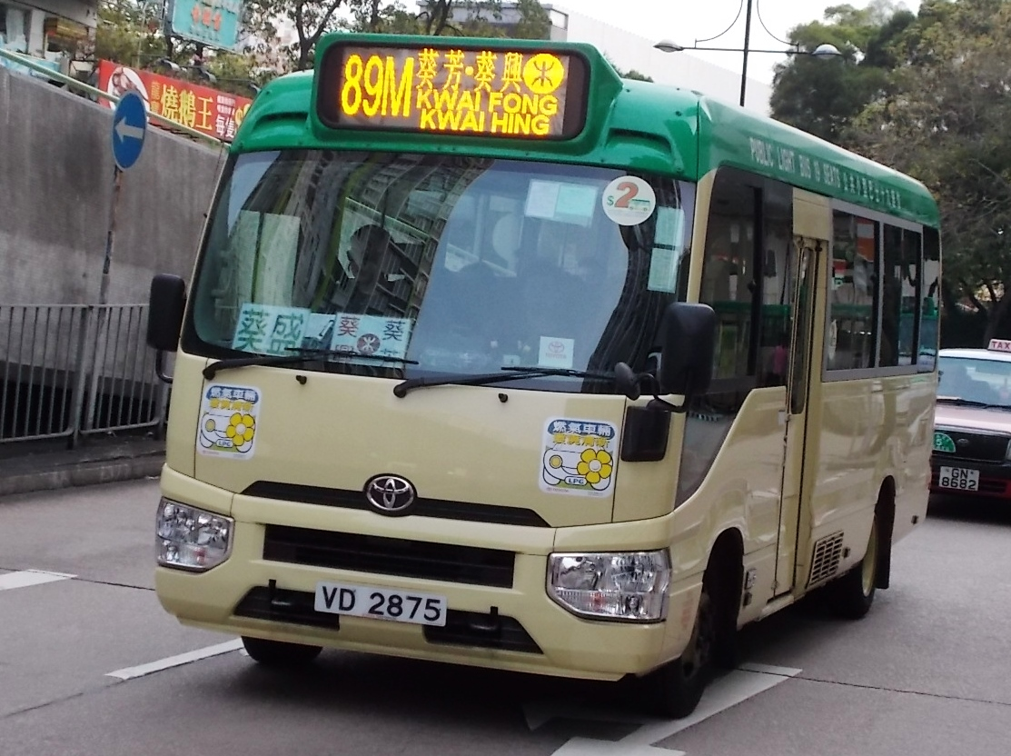 新界專線小巴89M線，駛經葵芳地鐵站巴士總站外